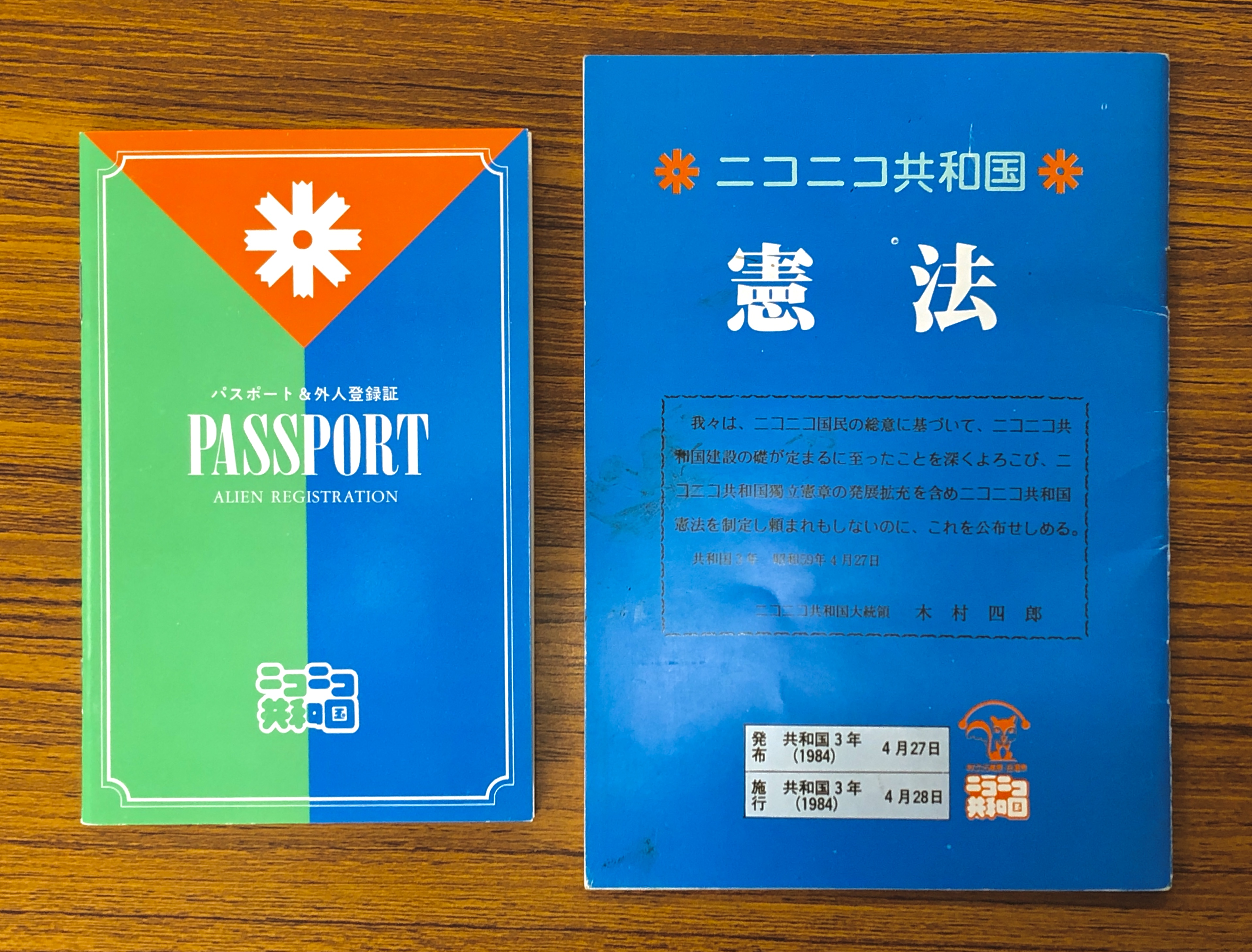 ニコニコ共和国に関する写真